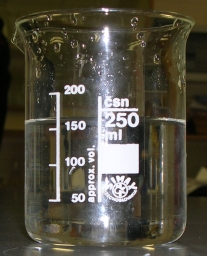 Vaso de precipitados del laboratorio